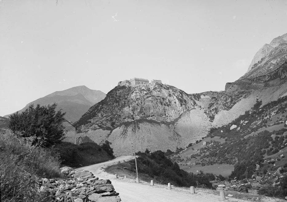 Imatge